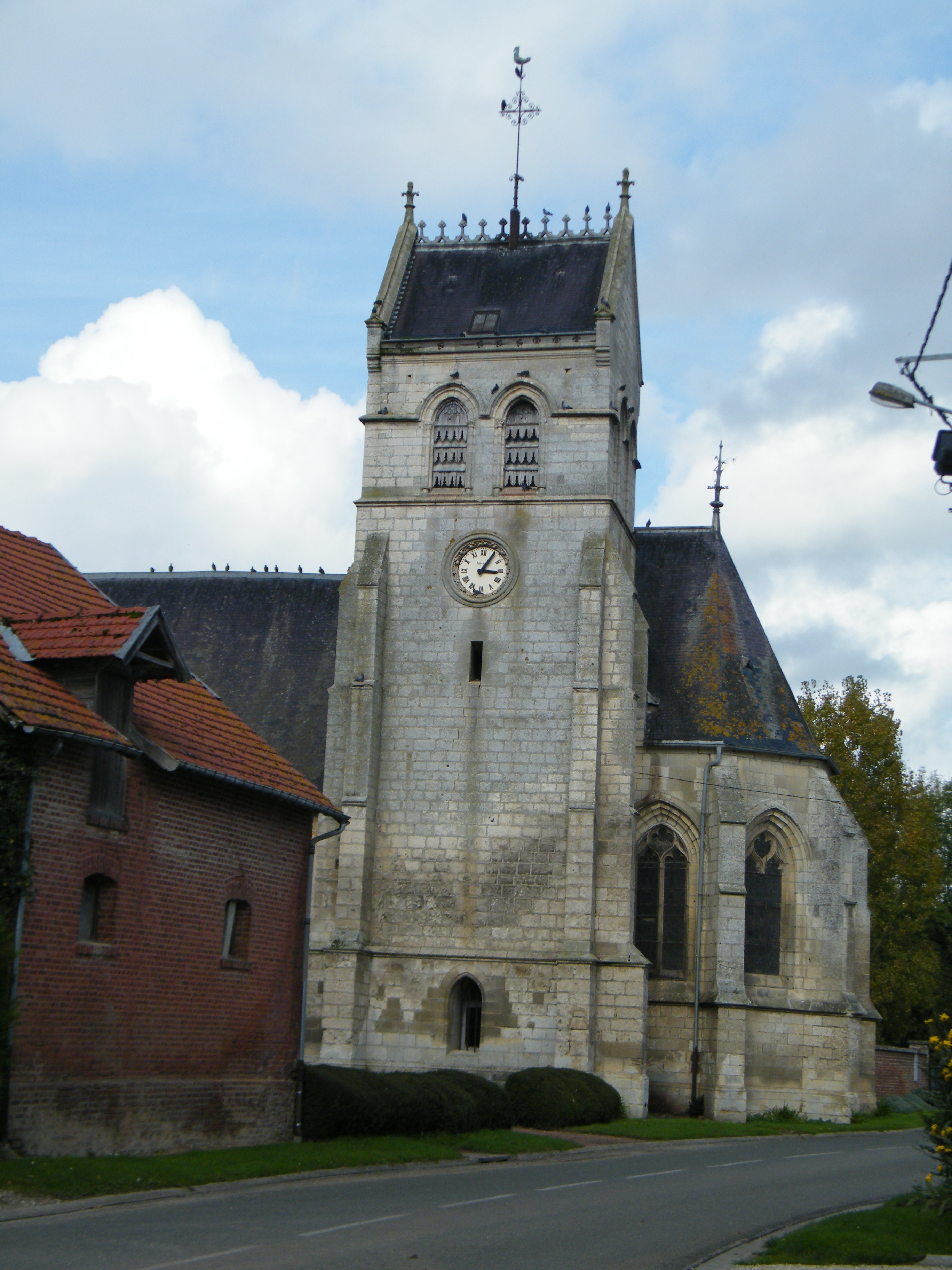 église.